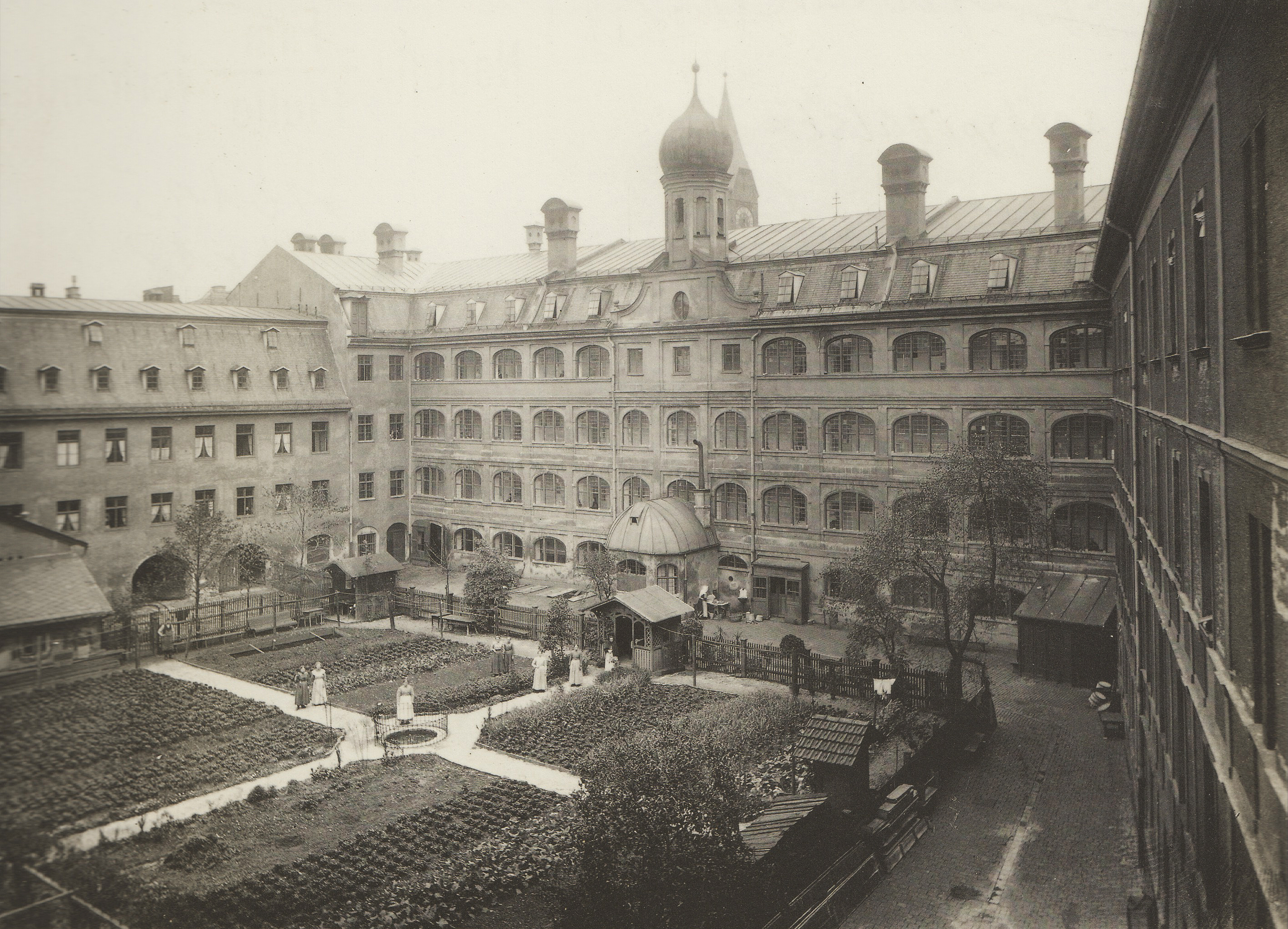 Blick vom Herzogspital in den Innenhof des Josephspitals (1913). Heute befindet sich hier das Stadtsteueramt.